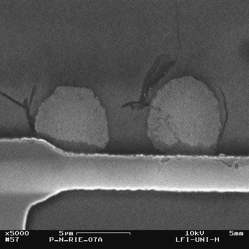 Aufnahme eines Ausfallortes verursacht durch Elektromigration in einer Kupferleiterbahn unter dem Rasterelektronenmikroskop. Die Passivierung wurde vorher durch Reactive Ion Etching (RIE) und Fluorwasserstoffsäure (HF) entfernt. Die Ätzprozesse sind dabei nicht erprobt gewesen und beruhen auf Versuchen das best mögliche Resultat zu erlangen.